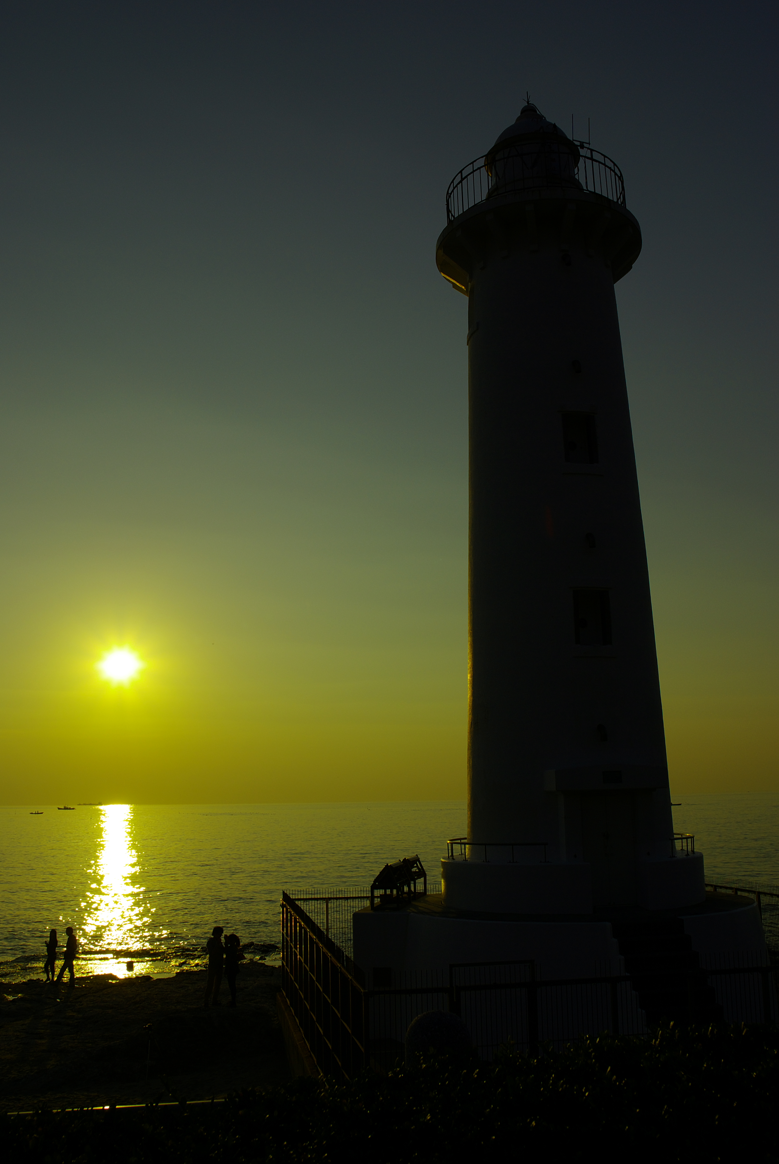 夕暮れの野間崎灯台と恋人達